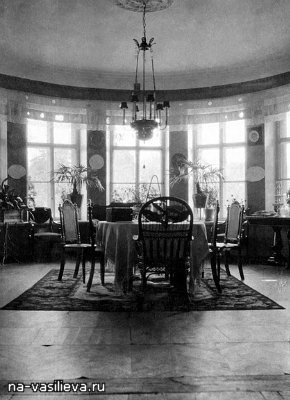 Интерьер комнаты в усадьбе Чоколовых в Горожанке (Рамонский район, Воронежская обл., Россия).